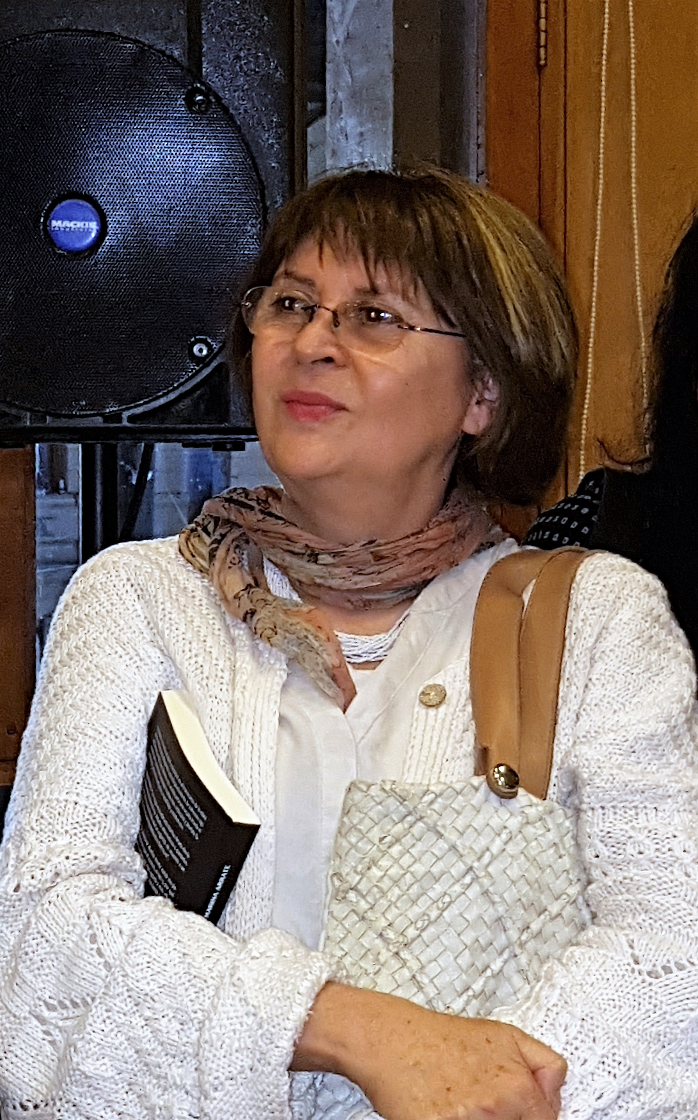 La poeta chilena Marina Arrate en la Feria Internacional del Libro de Santiago 2017 durante el homenaje al 1er Congreso Internacional de Escritoras desarrollado en Chile en 1987.